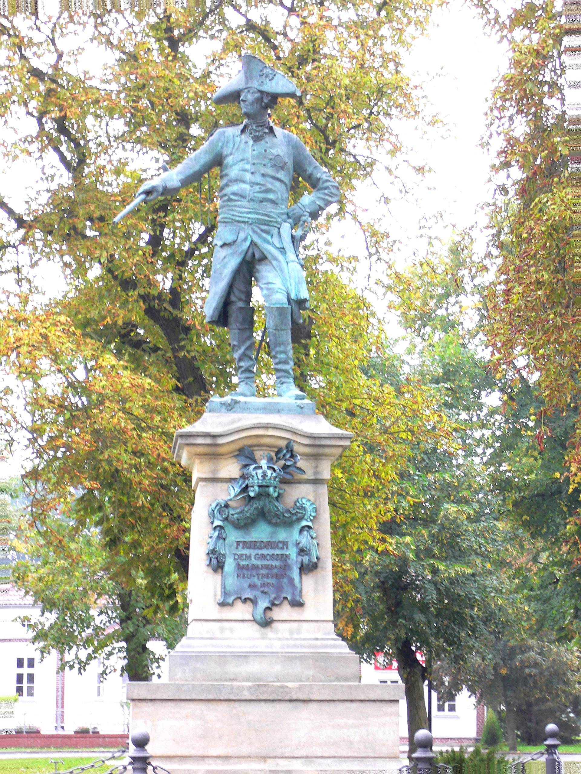 Der neue Alte Fritz in Neutrebbin im Oderbruch. Nach dem zerstörten Original von Heinrich Wefing (1904) durch den Bildhauer Roland Rother 1994 neu errichtet.